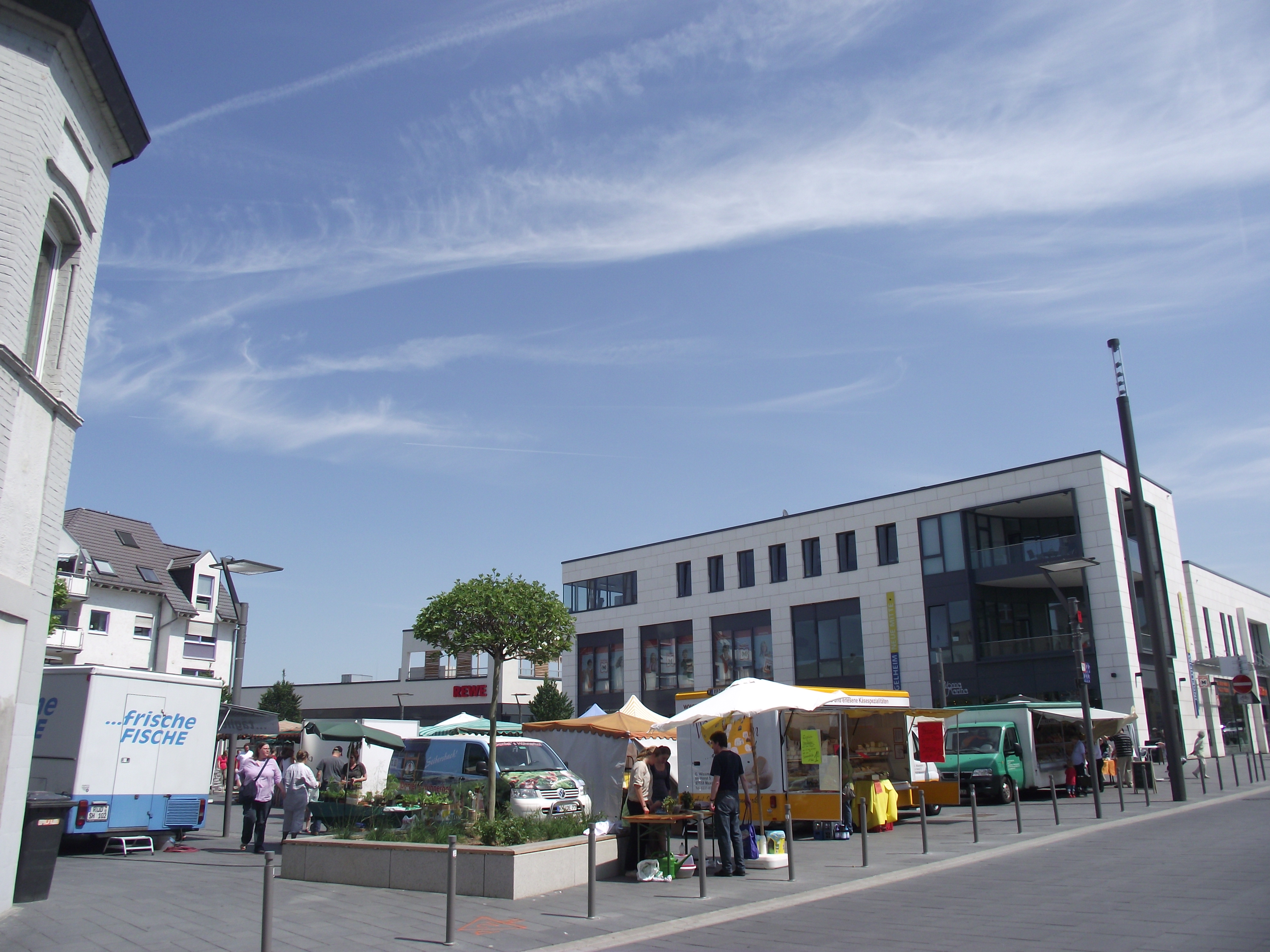 Neue Mitte eröffnet im November 2011 in Ingelheim mit Stadtplatz und Wochenmarkt.